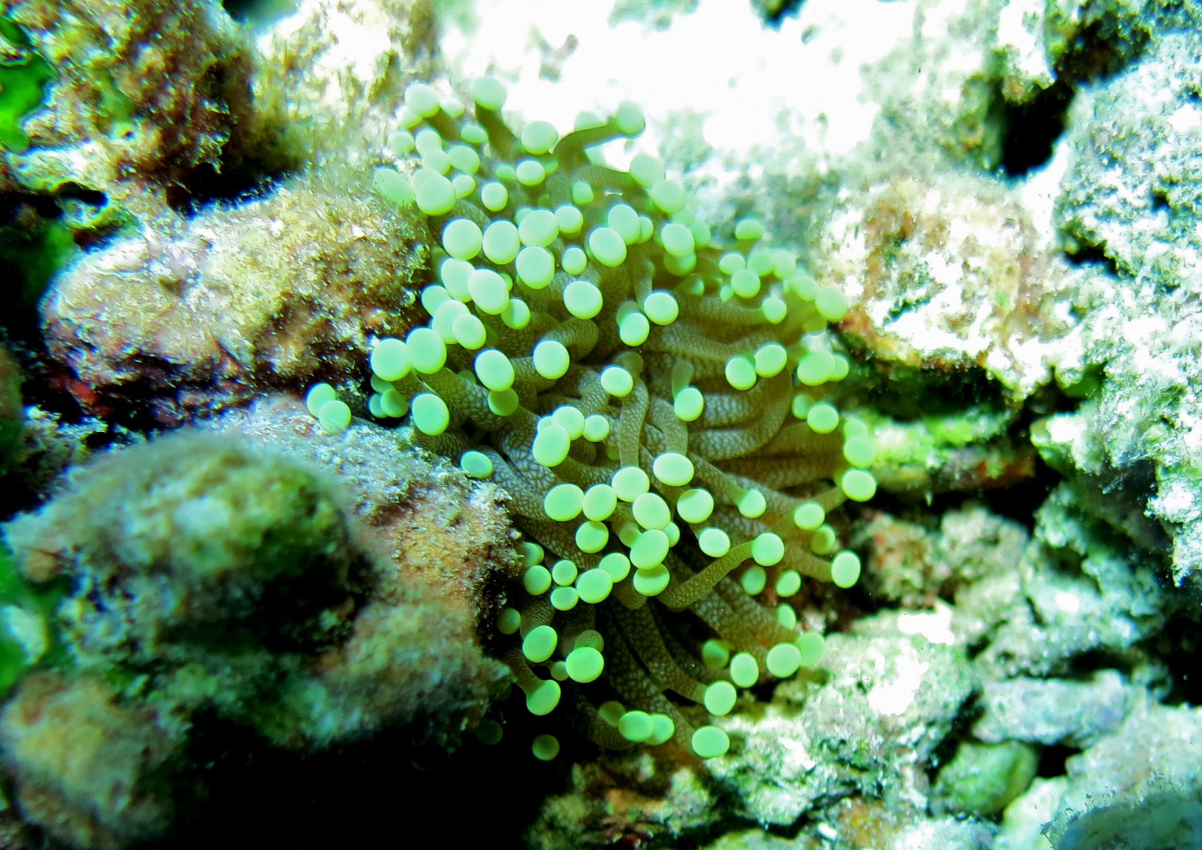 Une colonie de corail-flambeau (Euphyllia glabrescens), aux Maldives (Hulhudhoo, atoll de Baa).